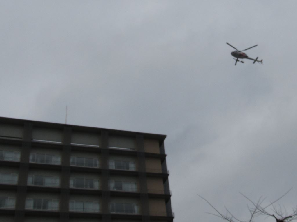 東京都立多摩総合医療センタードクターヘリ